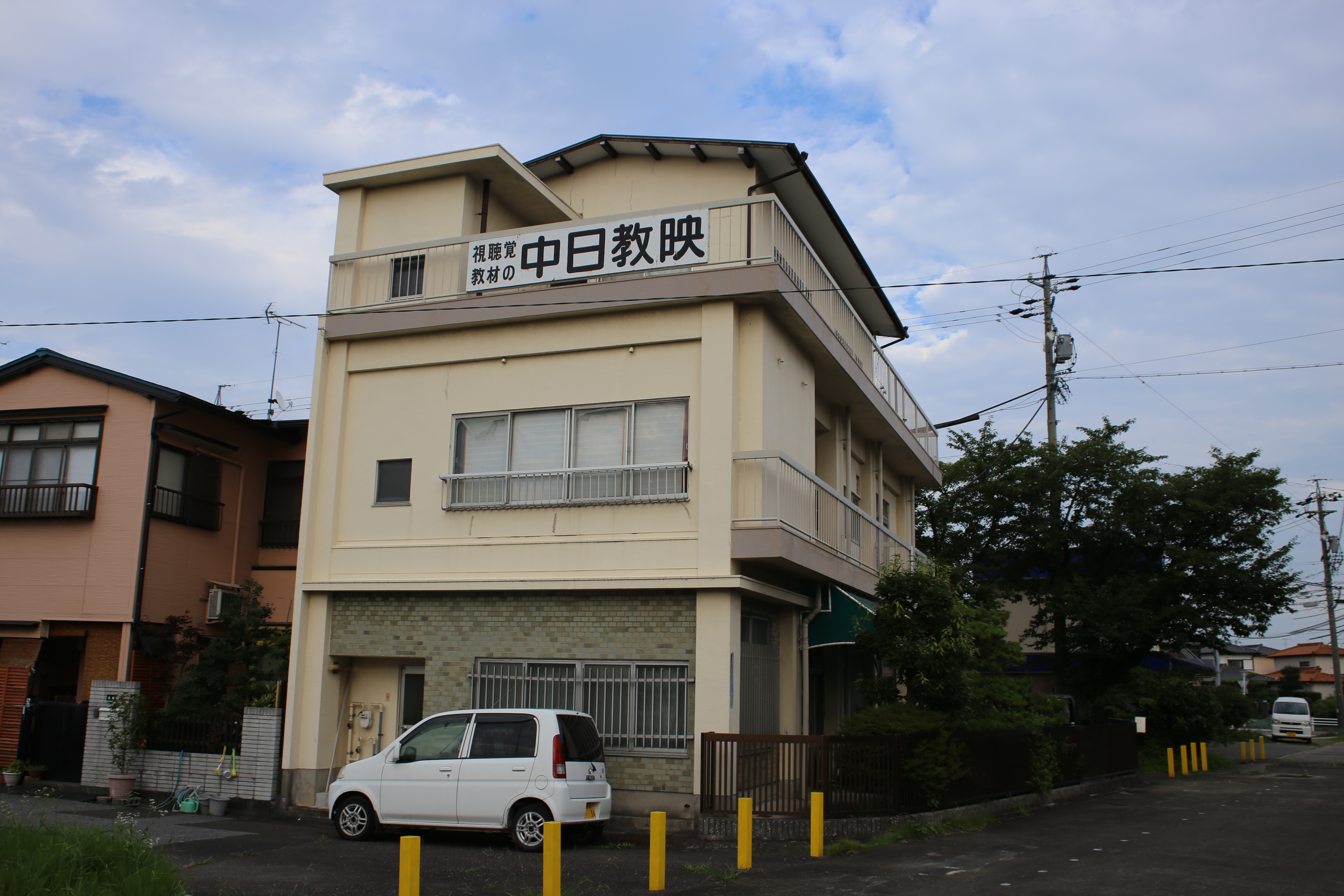 愛知県一宮市若竹一丁目の中部日本教映本社